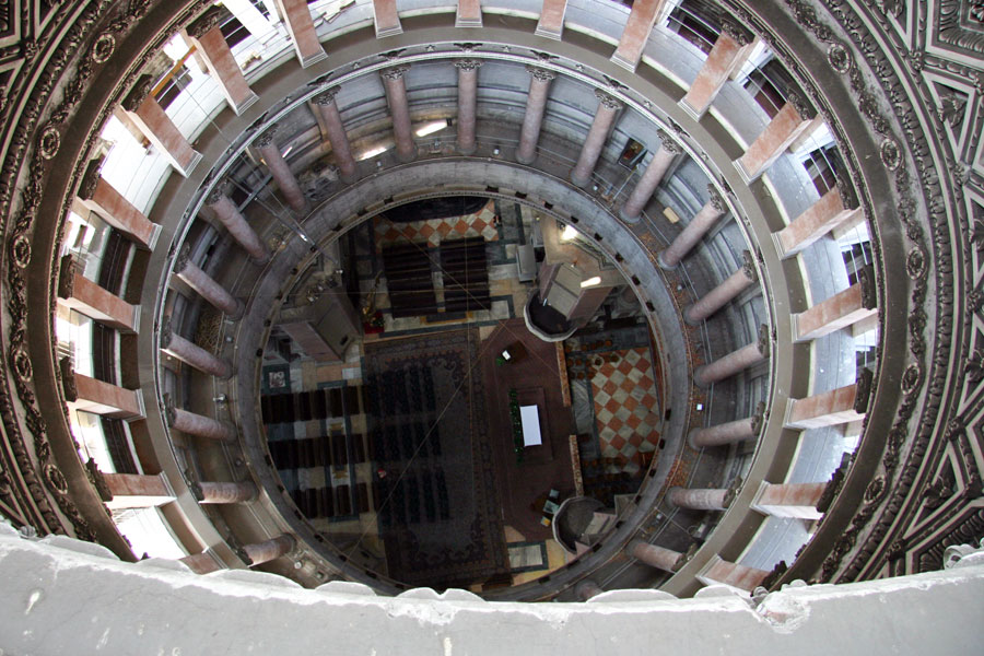 Basilica di San Gaudenzio, Novara, visuale dalla cupola verso il pavimento della chiesa